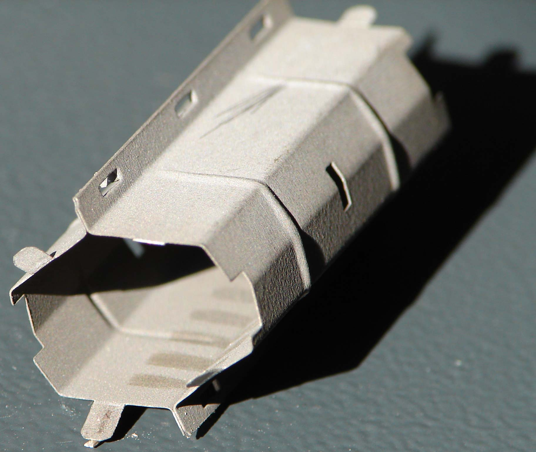 Einblick in den Anodenzylinder einer EL84 mit sichtbaren Spuren des Elektronenbombardements.